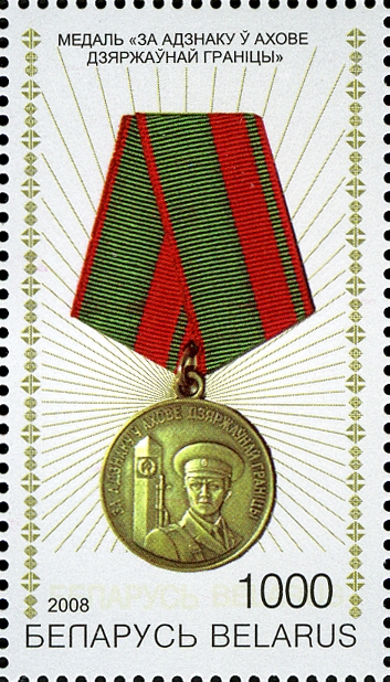 № 754. Медаль "За отличие в охране государственной границы"